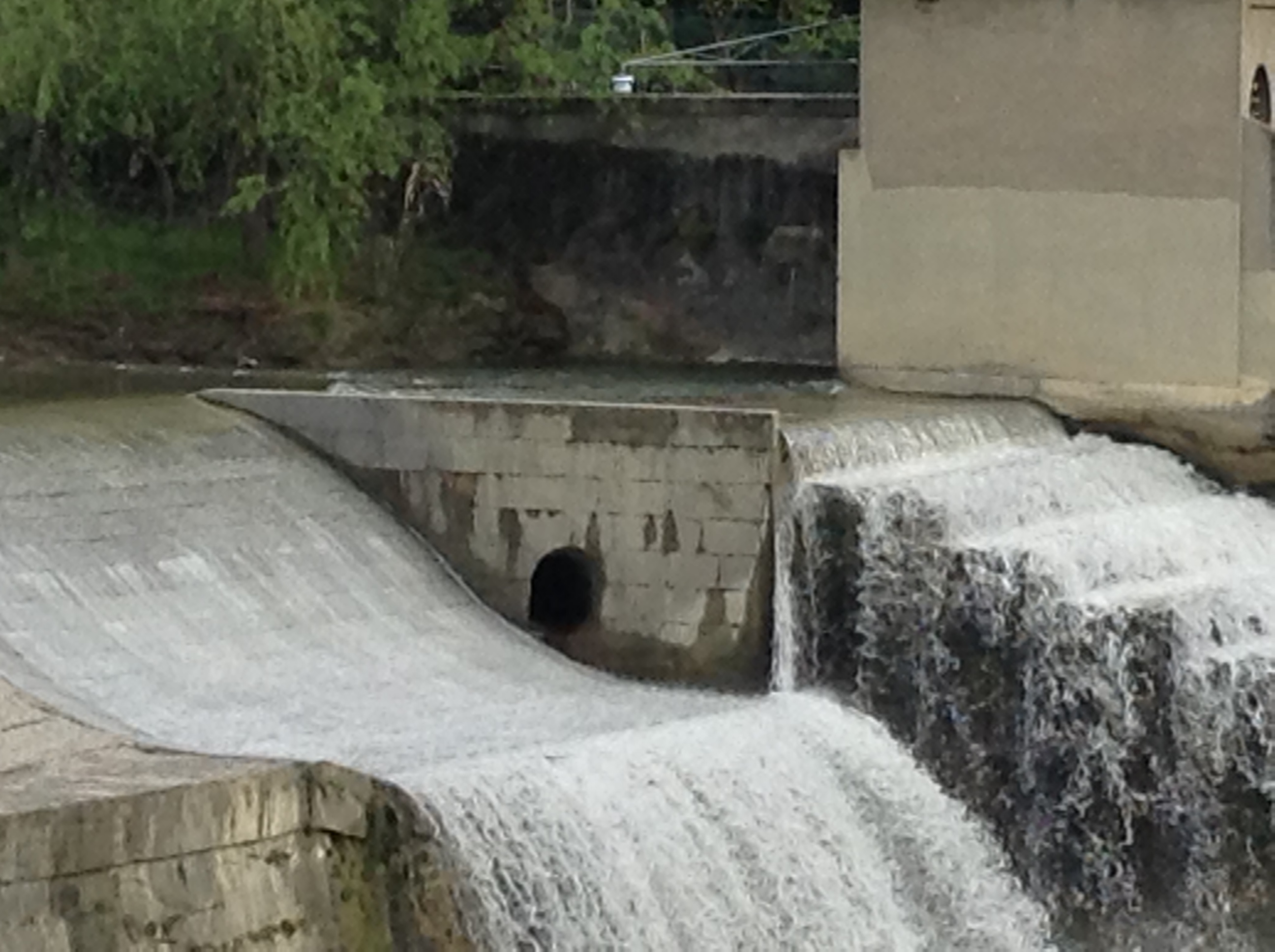 La cascata